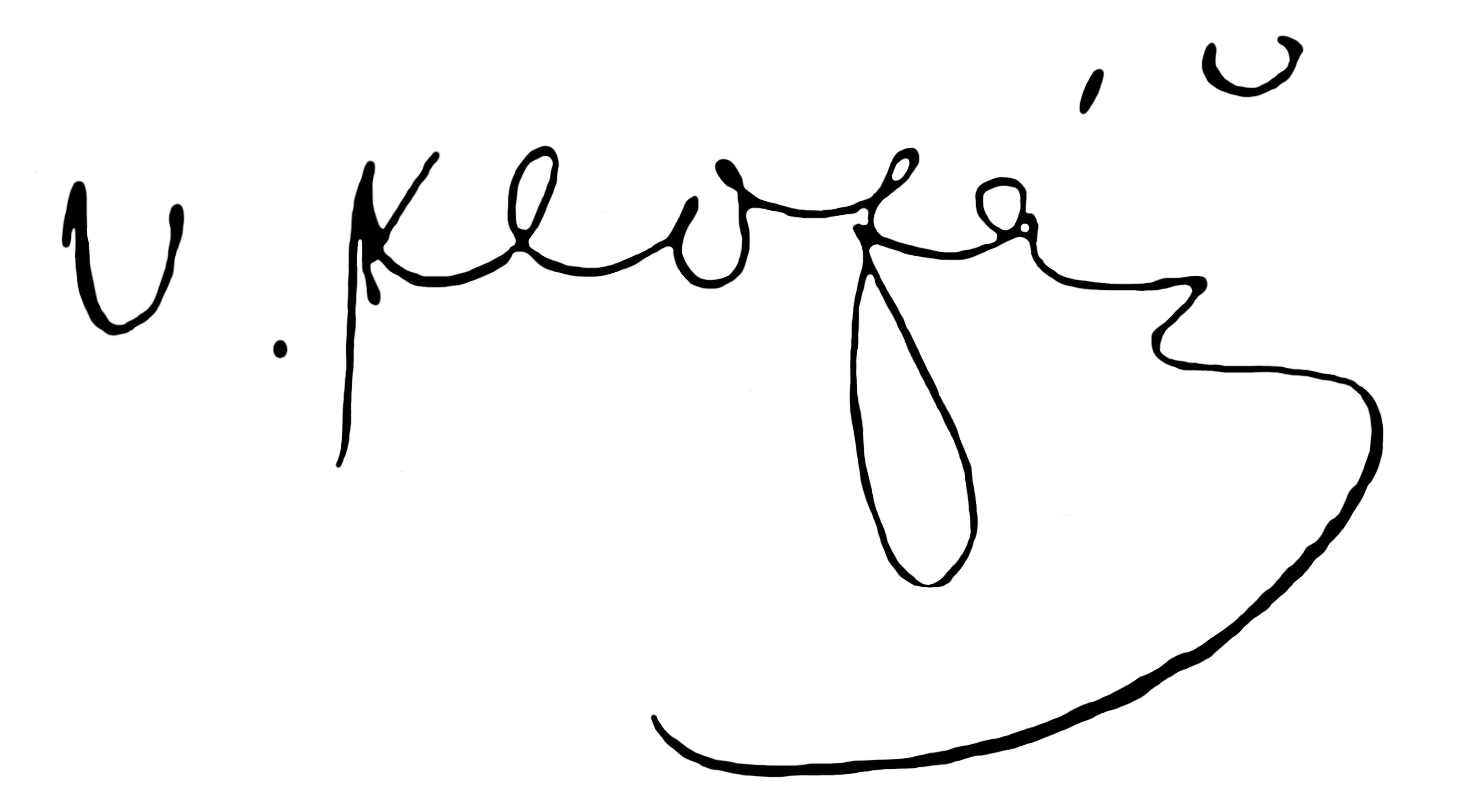 Podpis